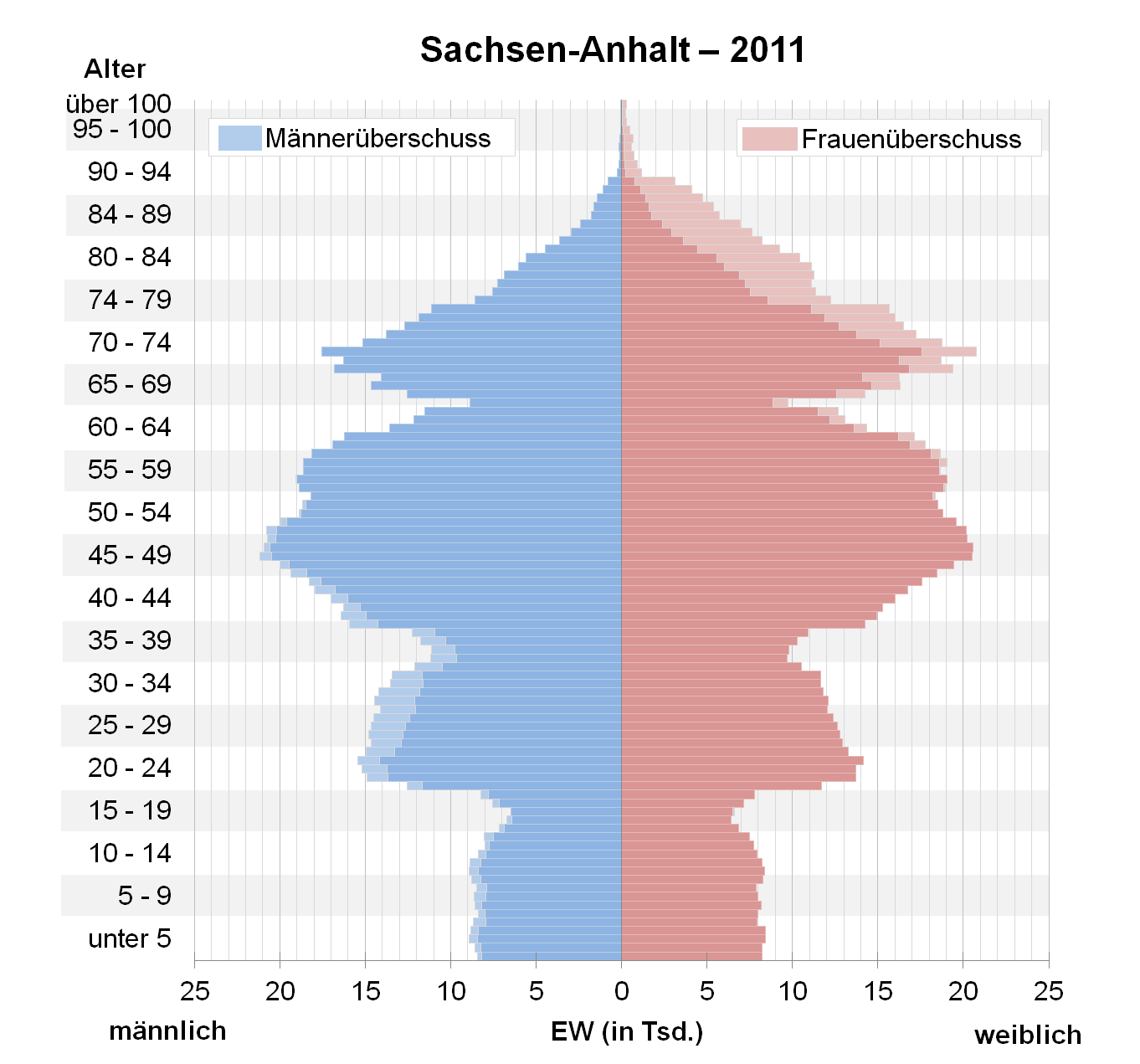 Bevölkerungspyramide des Bundeslandes Sachsen-Anhalt nach Zensus 2011.